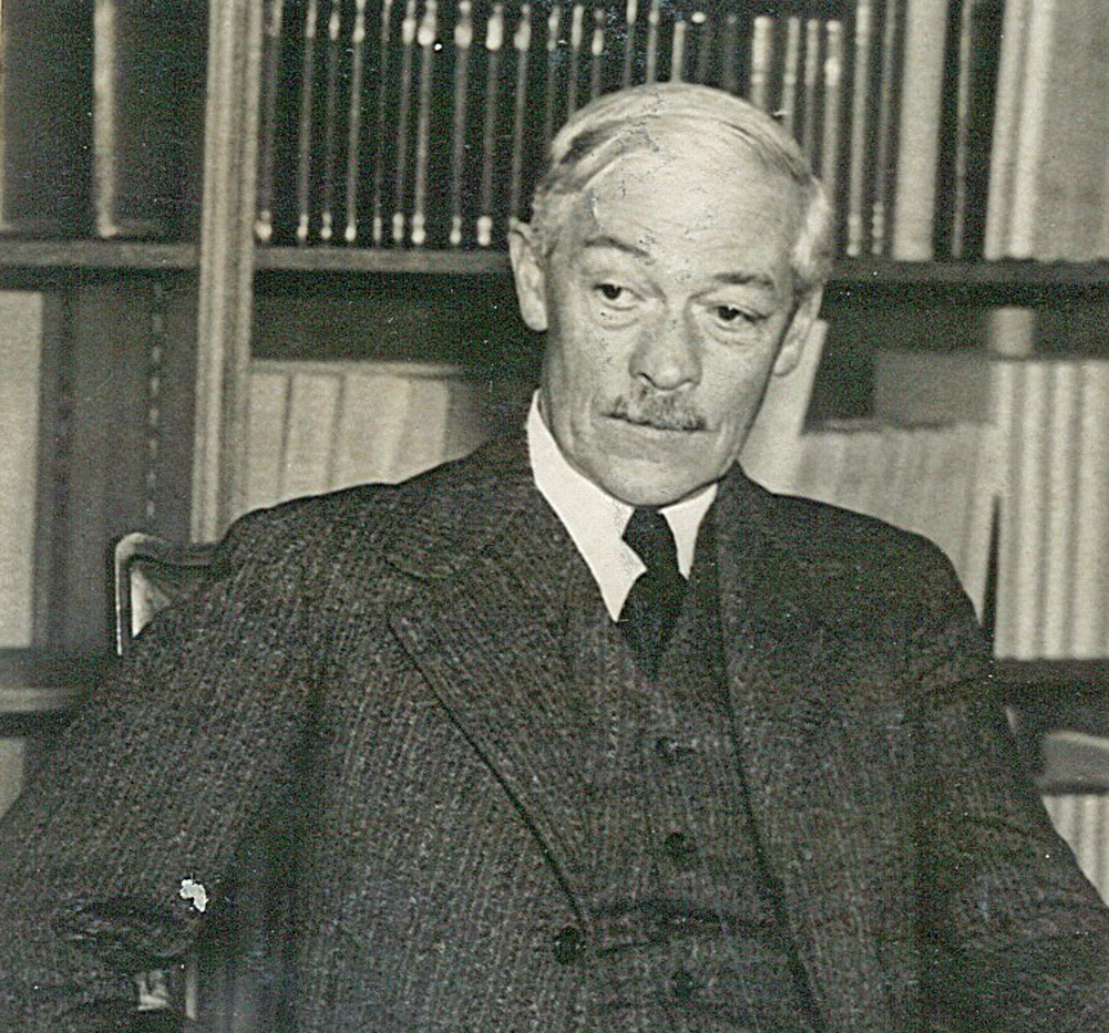 Haakon Shetelig, portrett, mann, arkeolog, konservator, professor, sittende knefigur. Fotografering:1940 (ca) Fotograf, sikker: ukjent person.